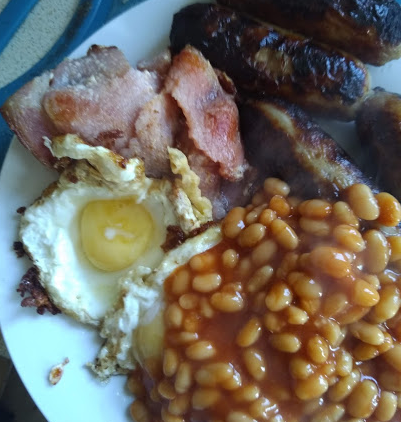 La fritata ovo